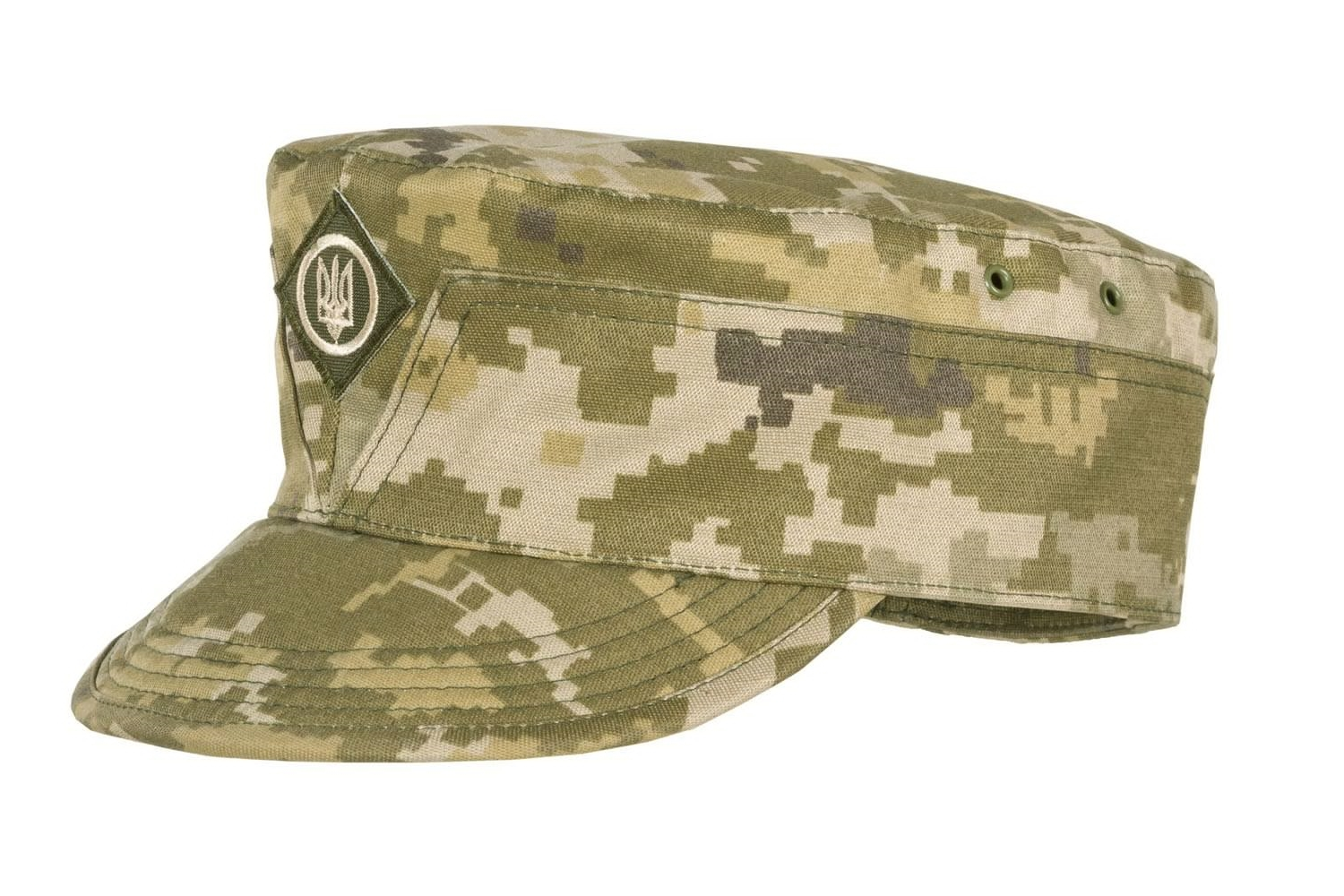 Мазепинка ЗСУ